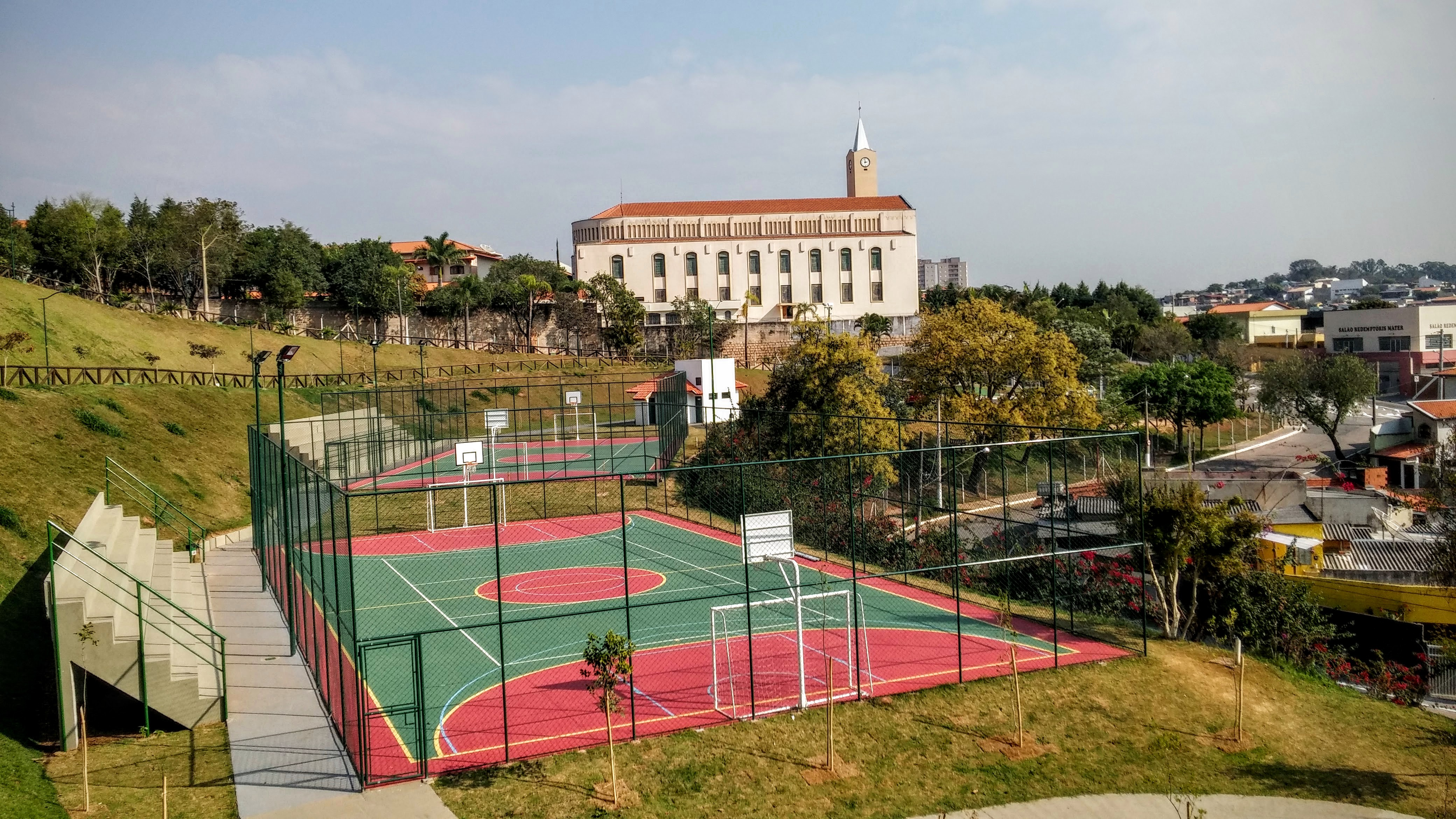 Jardim do Lago, Jundiaí - SP, Brazil